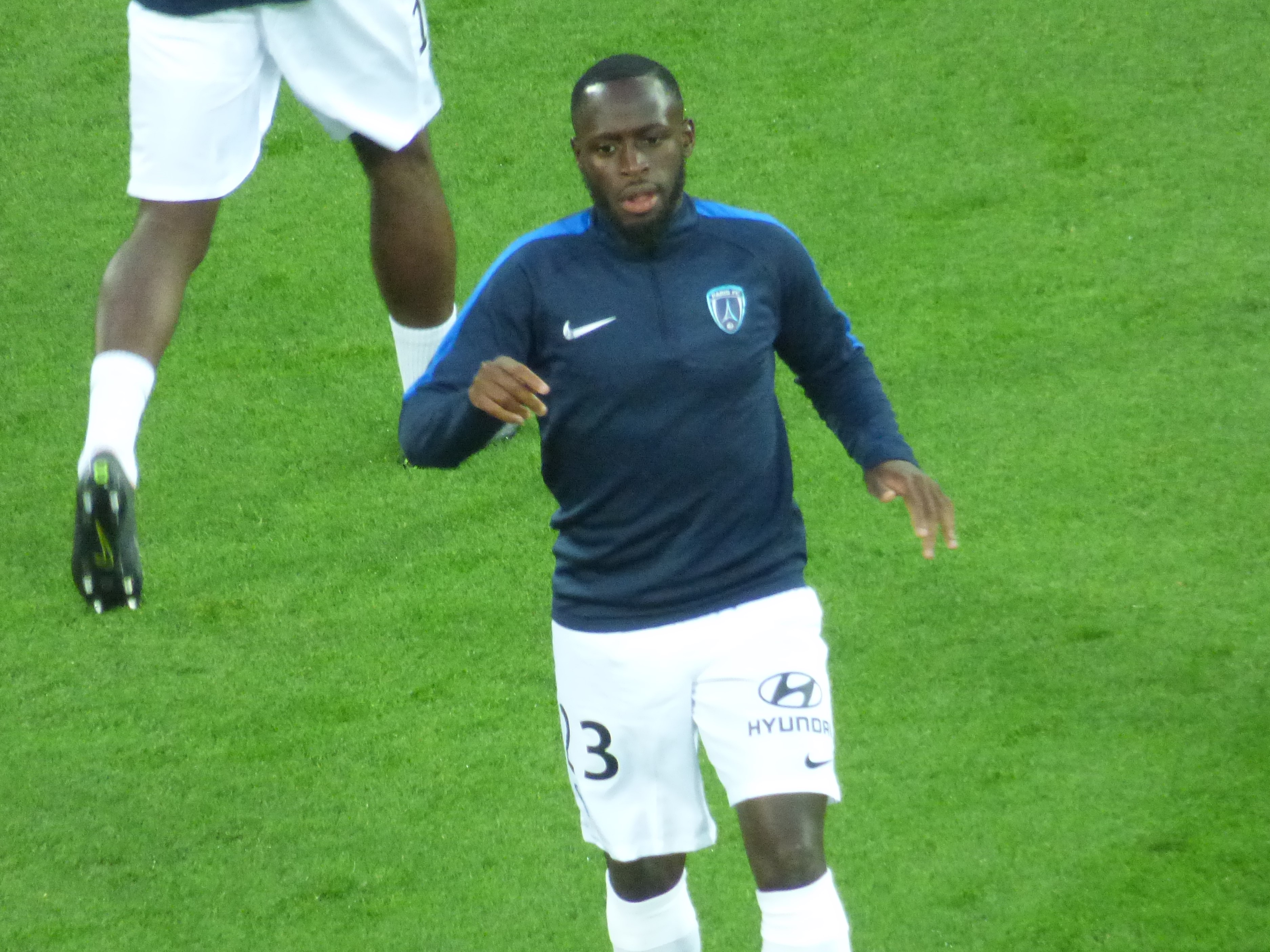 Souleymane Karamoko avant le match Lens / Paris, comptant pour la neuvième journée du championnat de France de football de Ligue 2, le 28 septembre 2018.